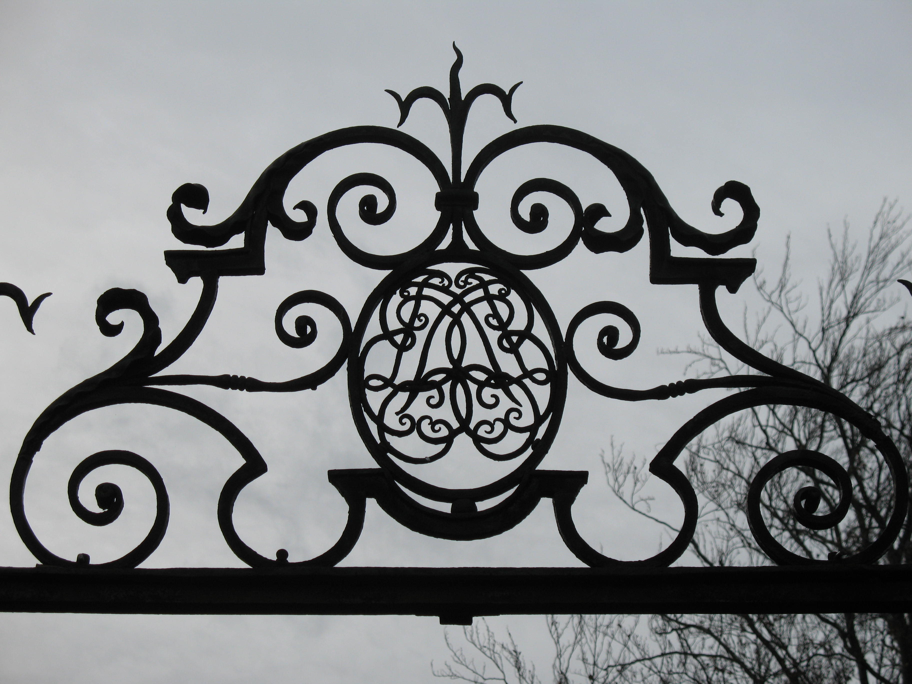 Château de Machy (Chasselay - Rhône) - Décoration de la grille d'entrée